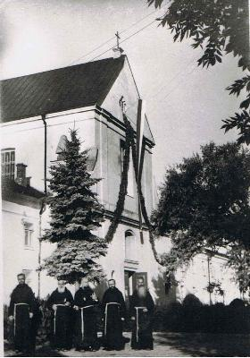 Капуцини в Острозі.